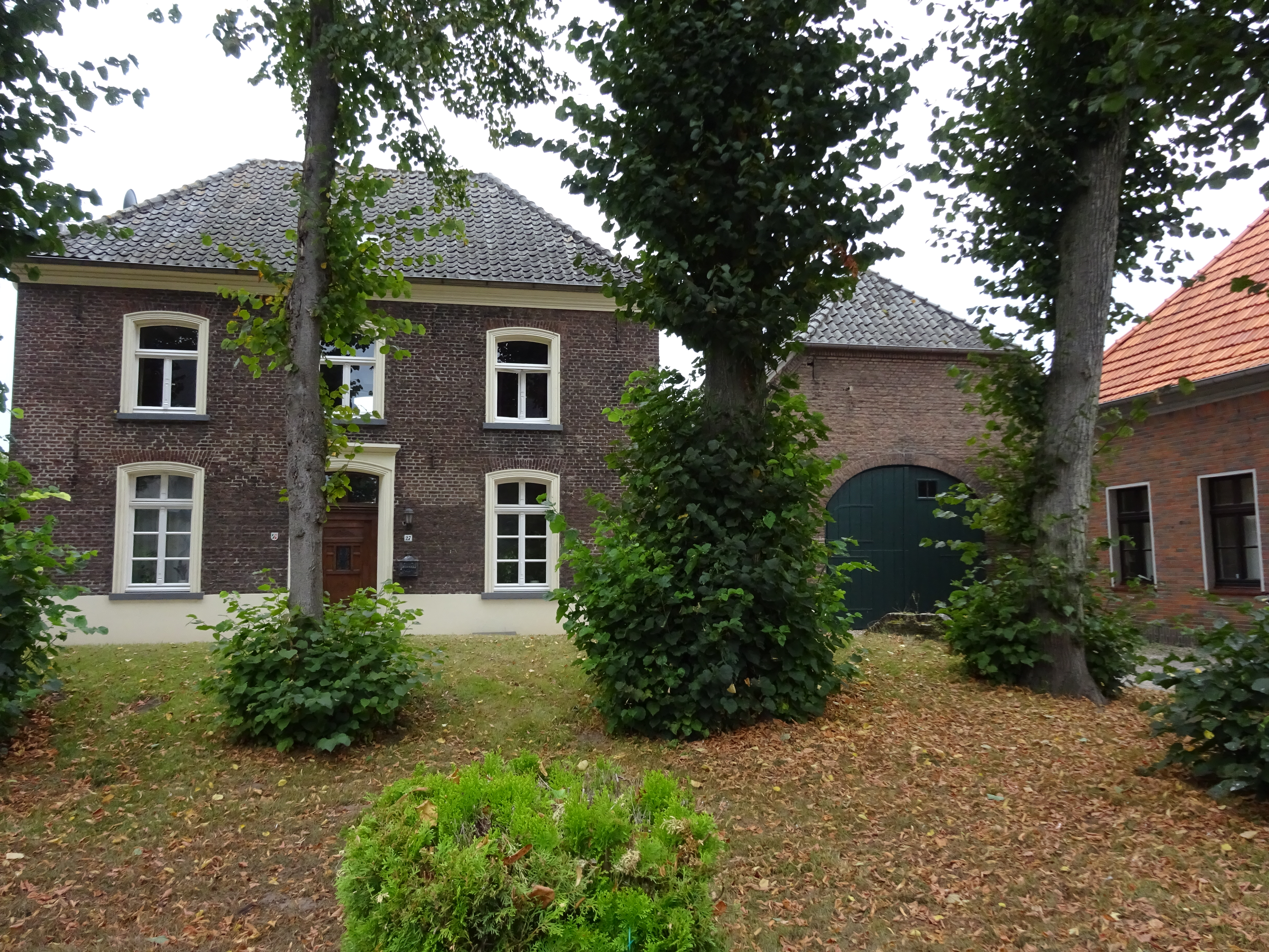 Köstersdick 27 Kalkar-Wissel